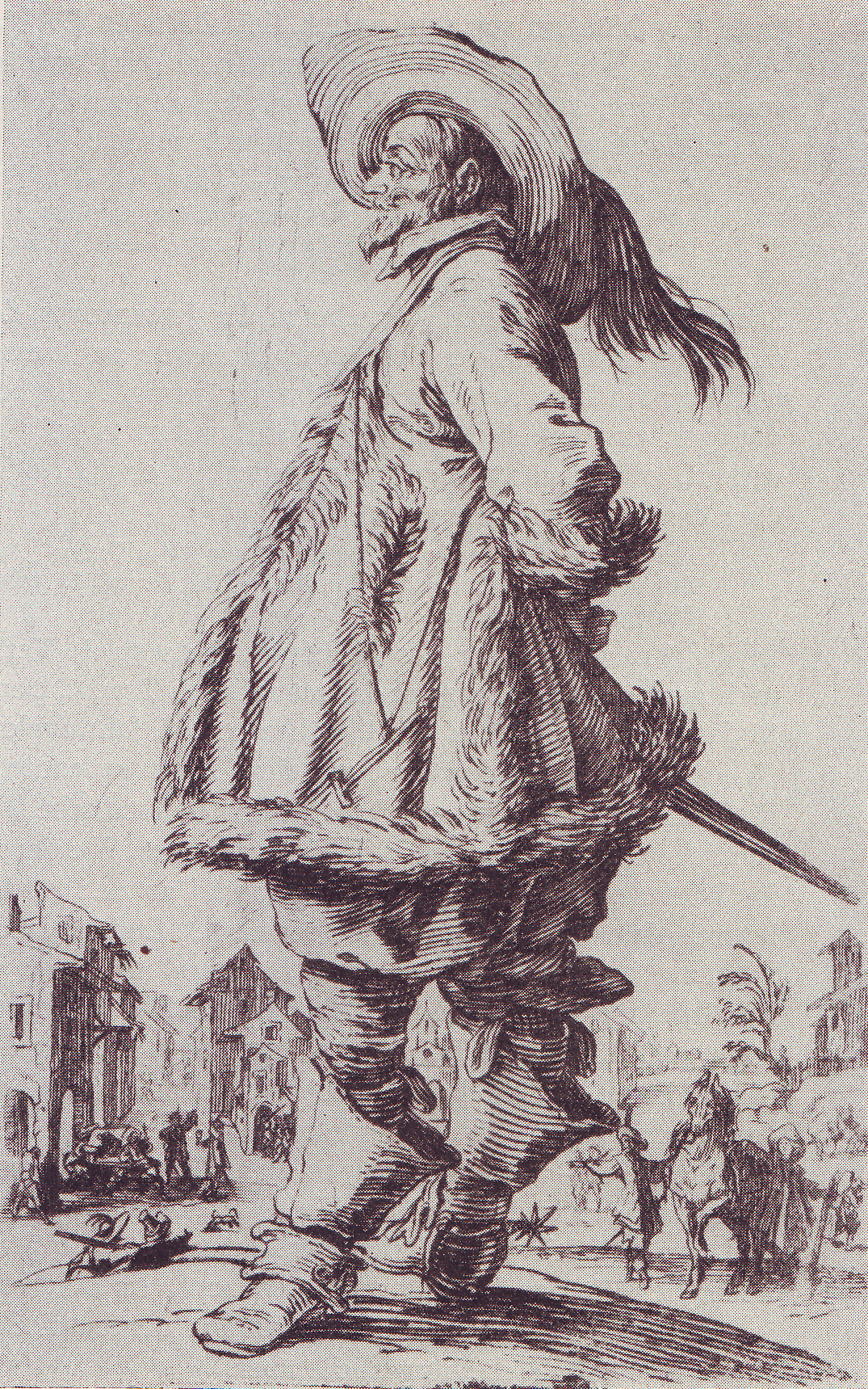 Kavalier aus der Folge „La noblesse lorrain“ von Jacques Callot.